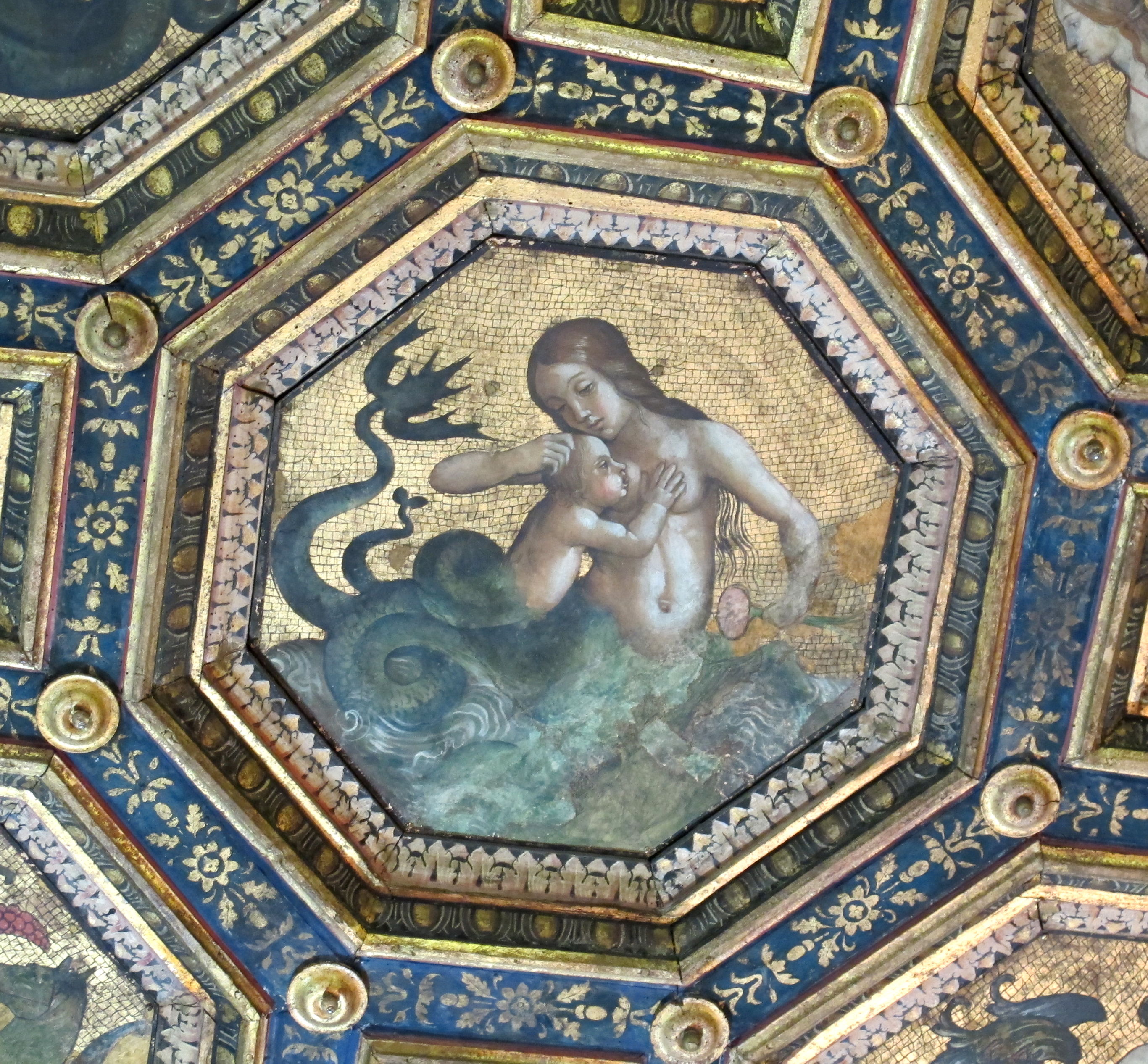 Palazzo dei Penitenzieri - Sala dei Semidei